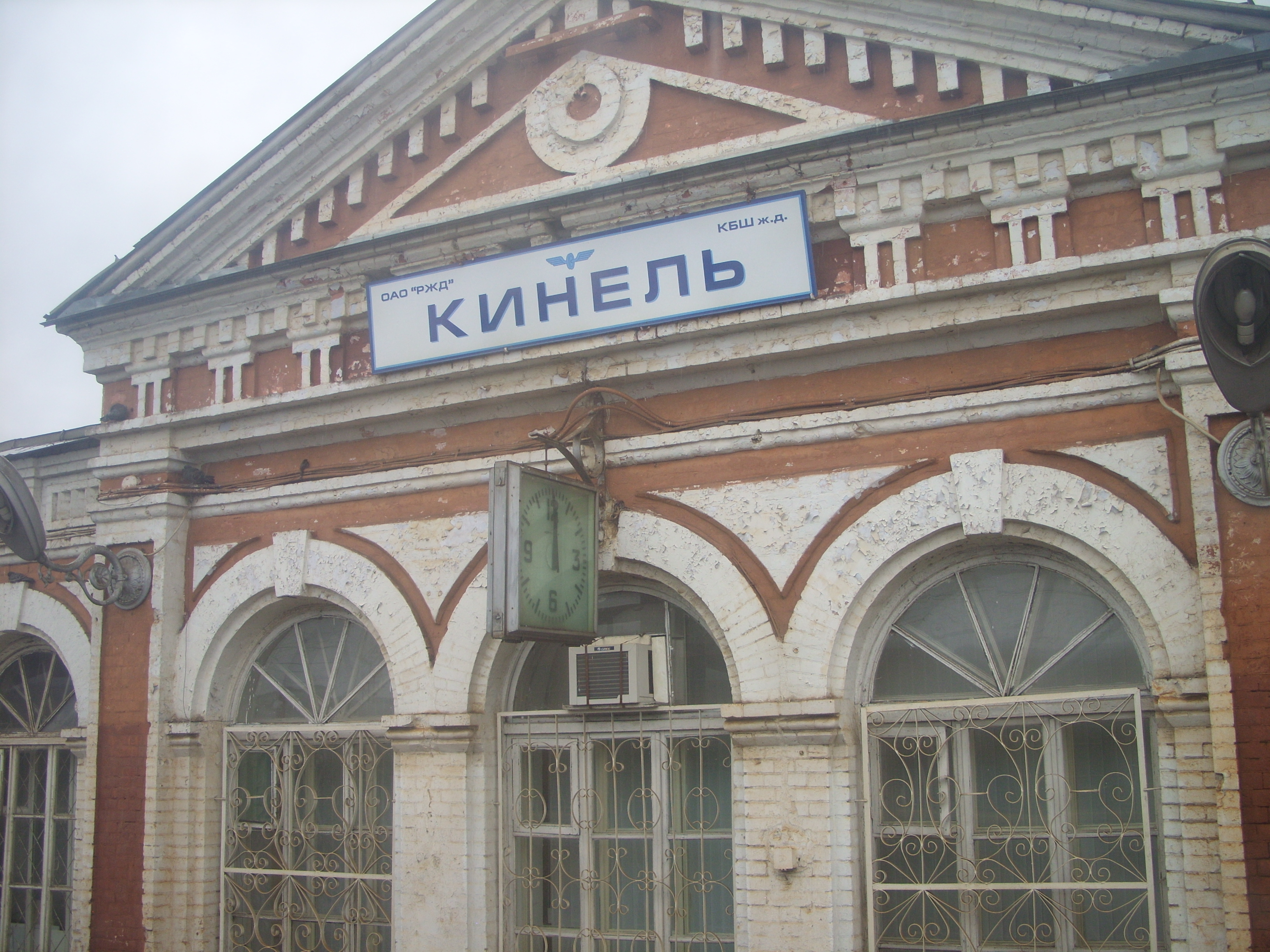 Самарская область, Россия